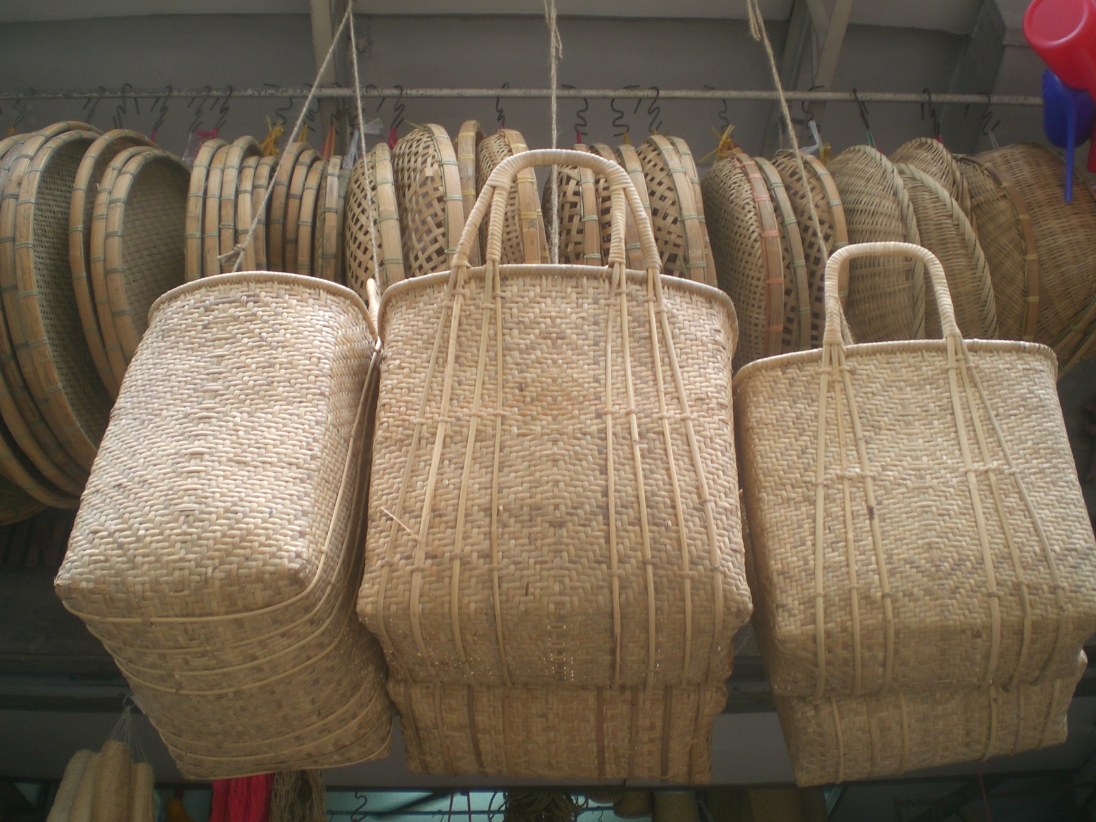 上環街景